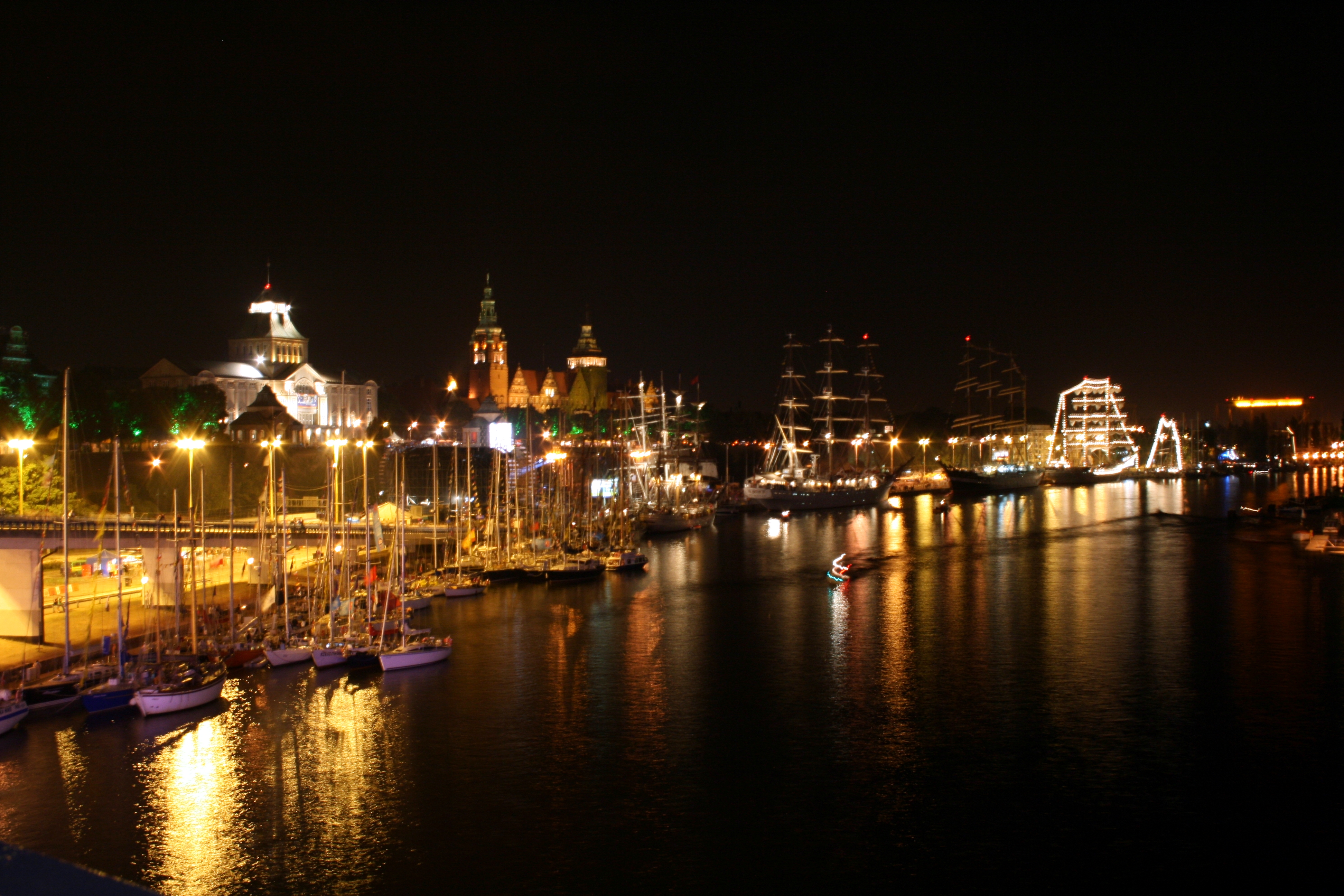 Szczecin by night